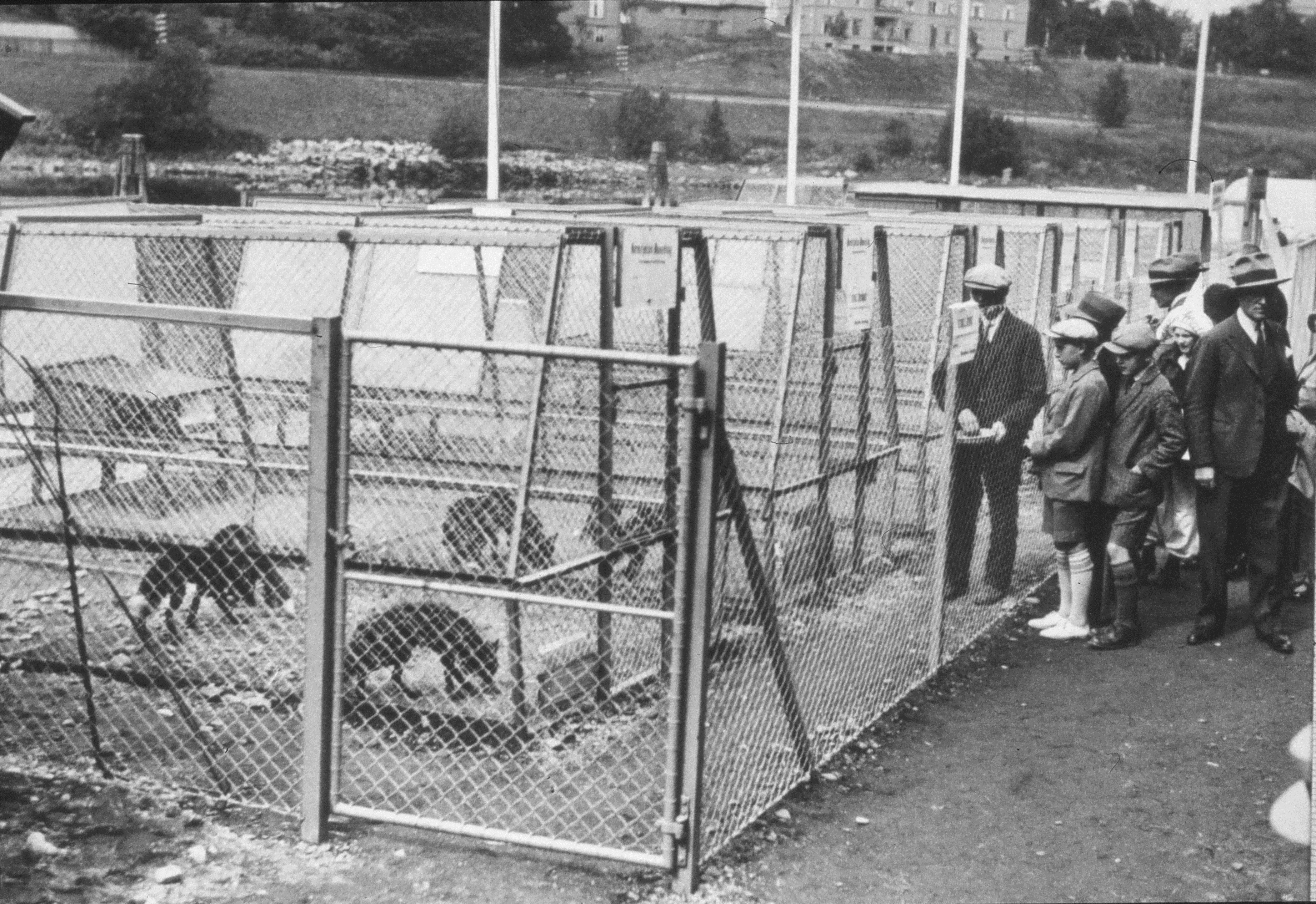 Fra Byantikvarens lysbildesamling.